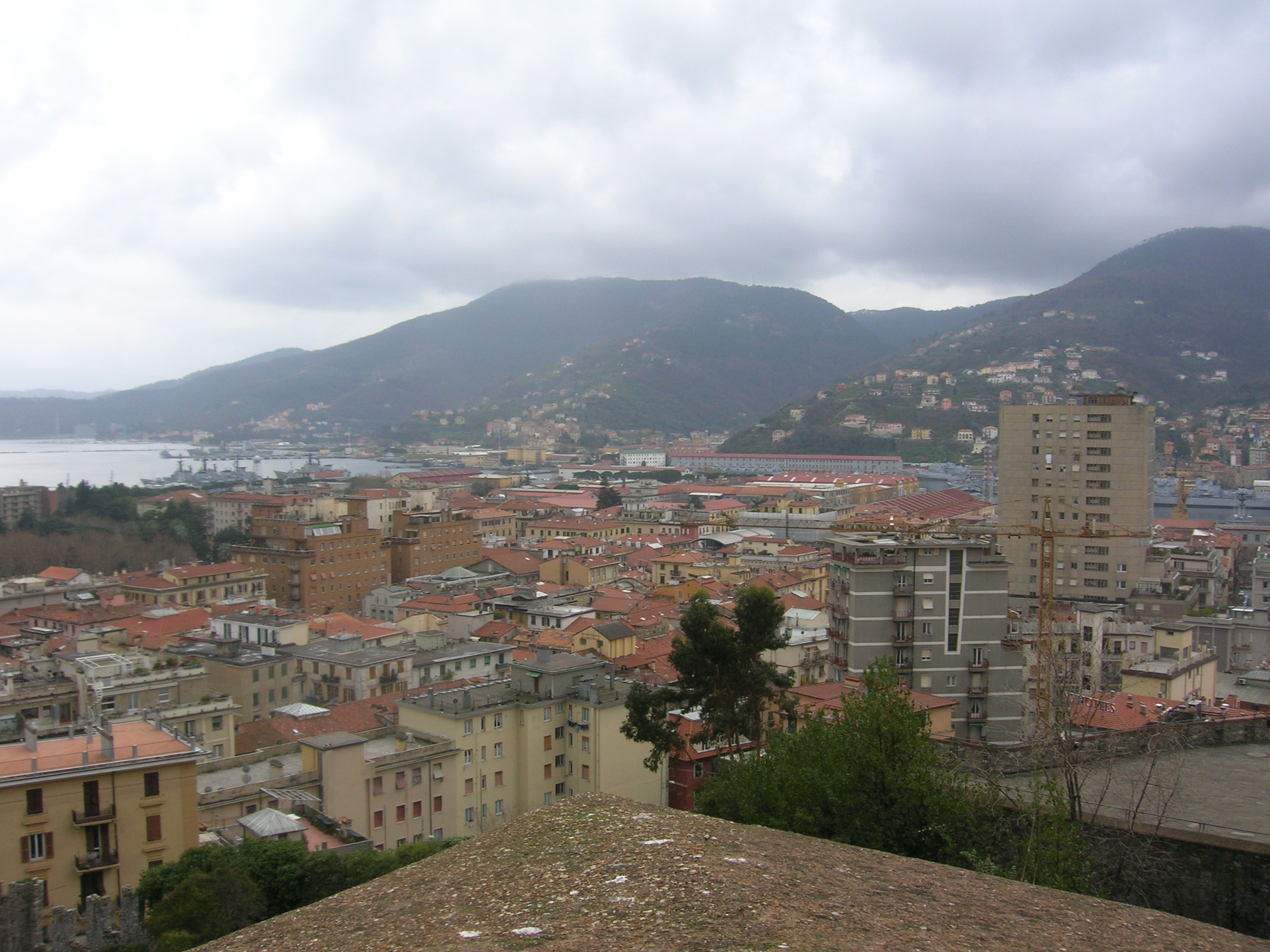 La Spezia - Castello San Giorgio panorama dalle terrazze